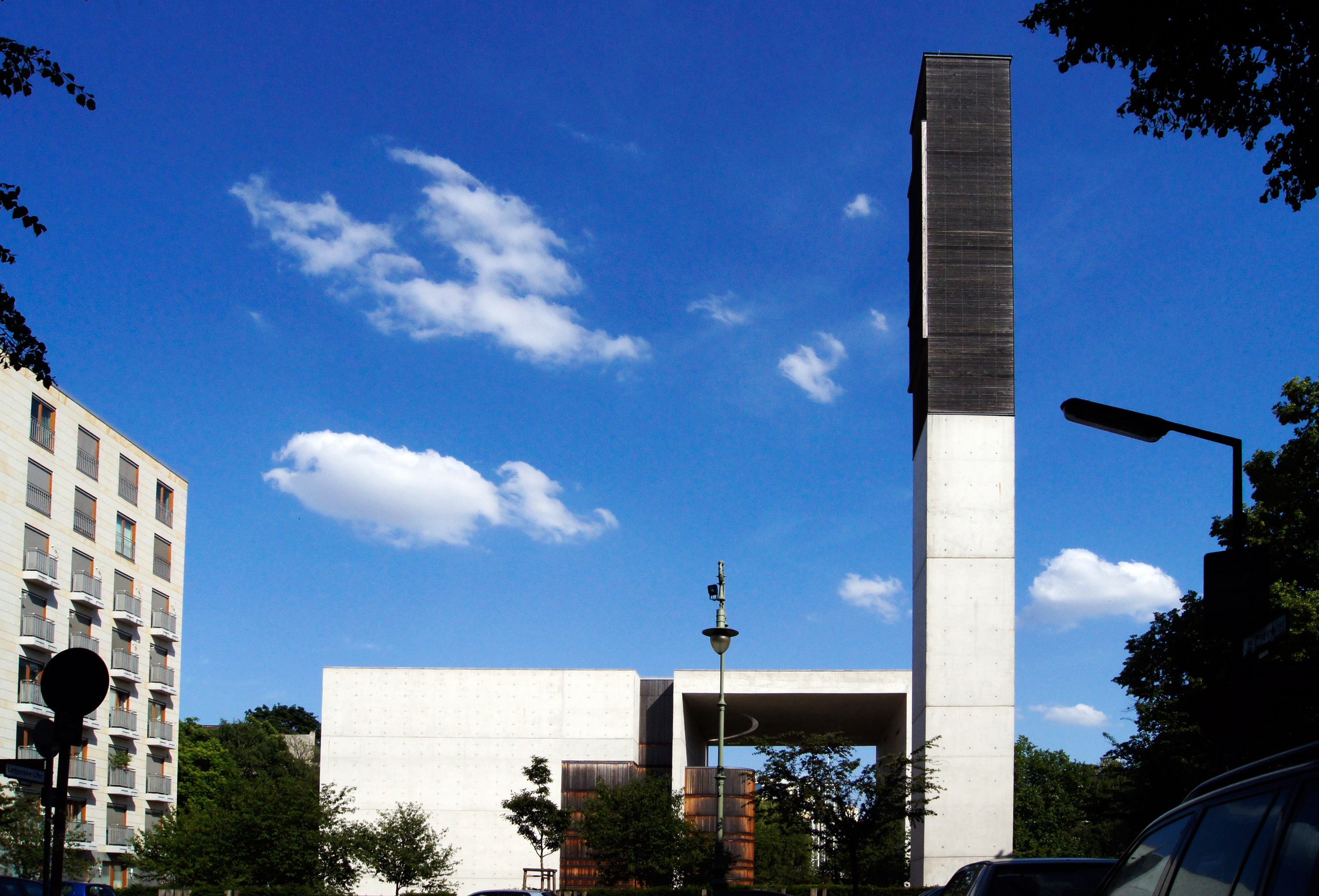 Katholische Kirche St. Canisius in Berlin (Charlottenburg-Wilmersdorf), Gesamtansicht mit Turm, aufgenommen von der Witzlebenstraße.